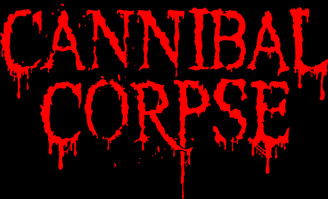 Segundo logotipo